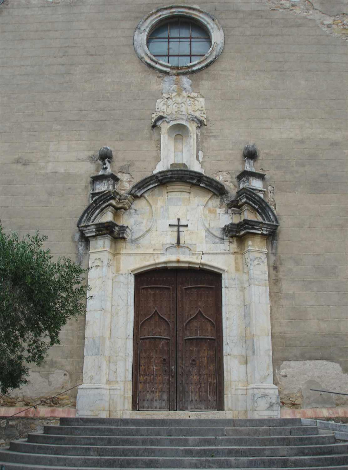 Església de Sant Sadurní de l'Heura (Girona, Catalunya, Espanya)